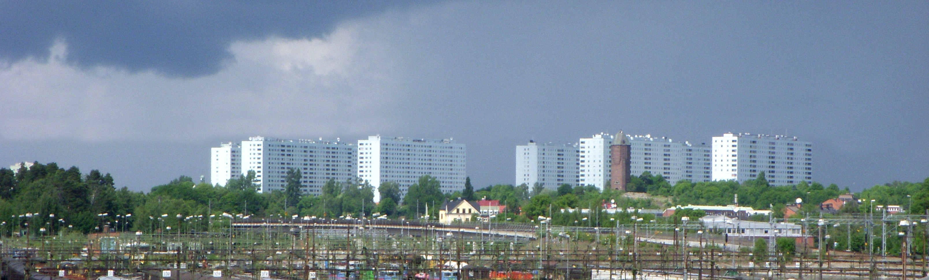 Hagalunds bostadshus sett från Tomteboda